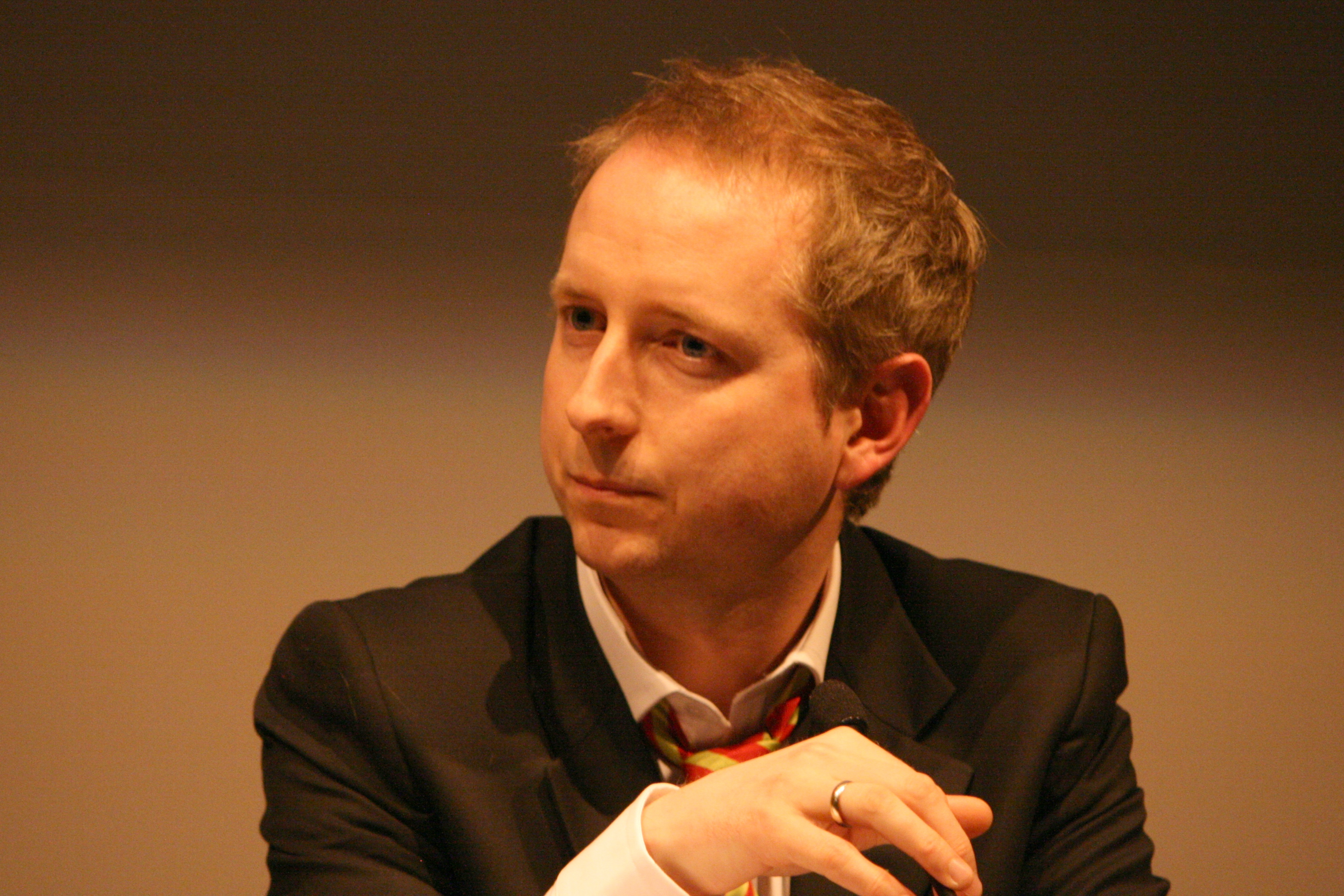 Bård Vegar Solhjell (SV) under paneldebatten i forbindelse med førpremieren på filmen Urospredere.